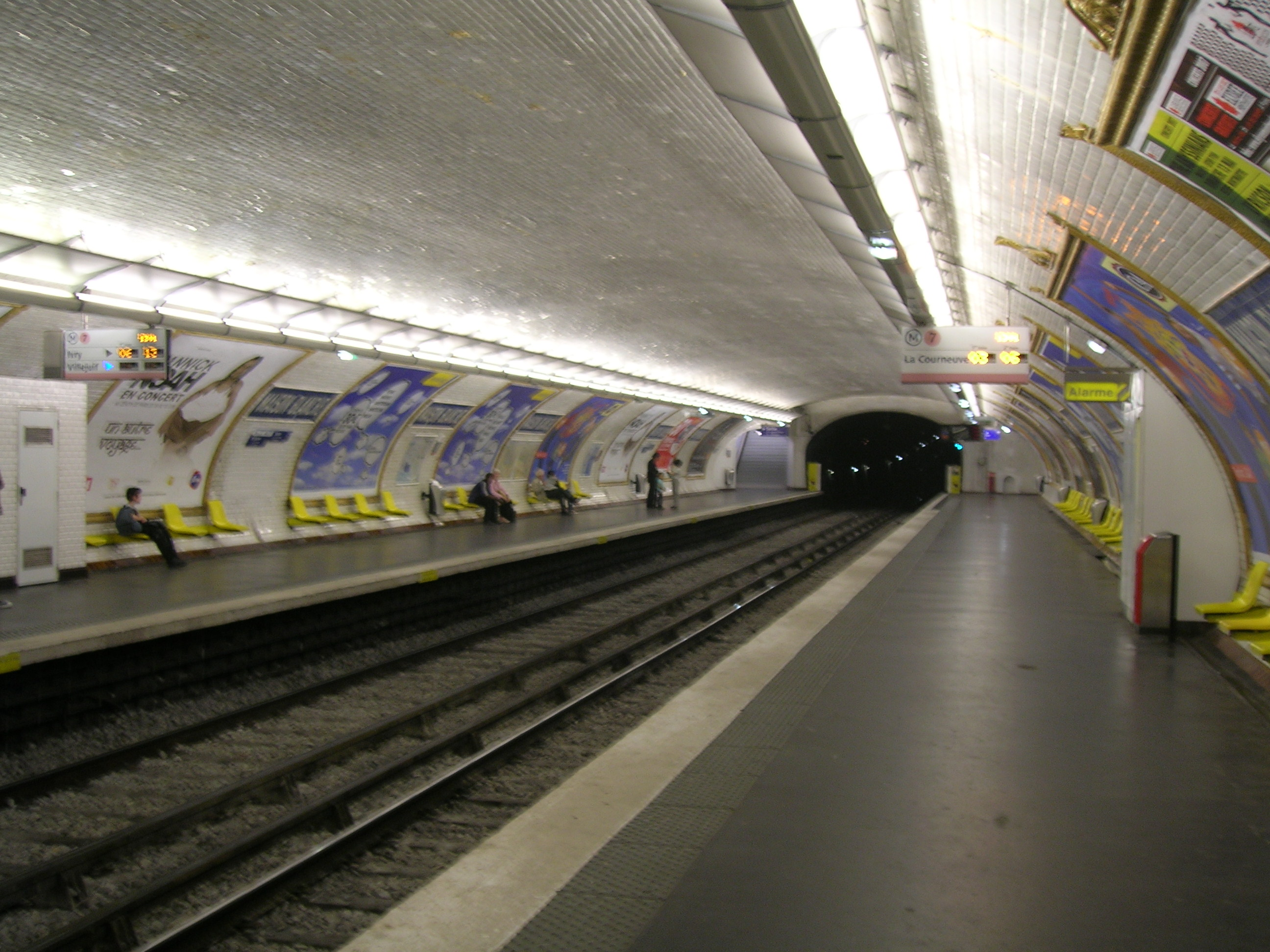 Quais de la station de métro Maison Blanche, ligne 7, Paris